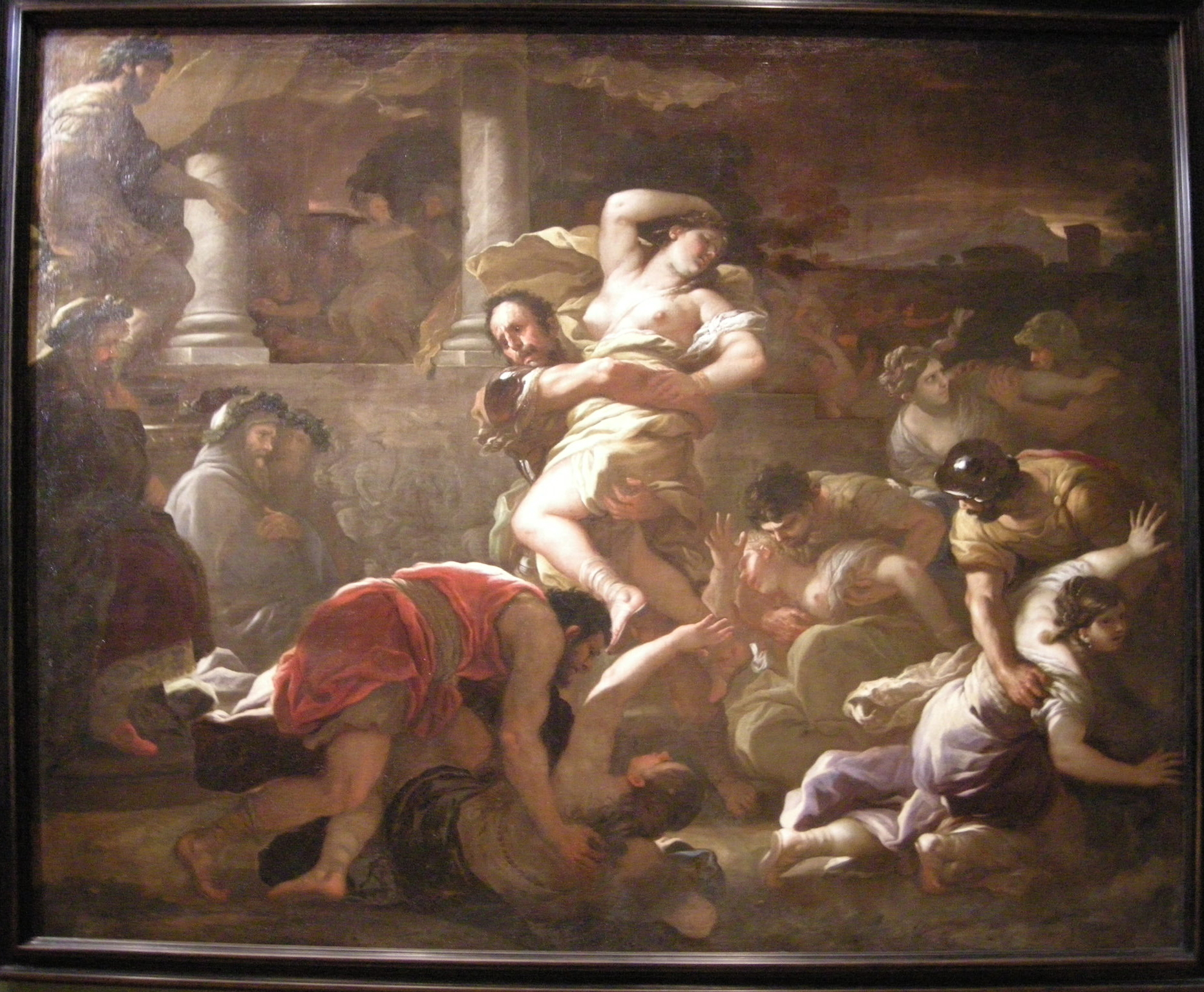 Enlèvement des Sabines par Luca Giordano, peint vers 1672-1674 et exposé à la National Gallery of Victoria à Melbourne (Ausralie).